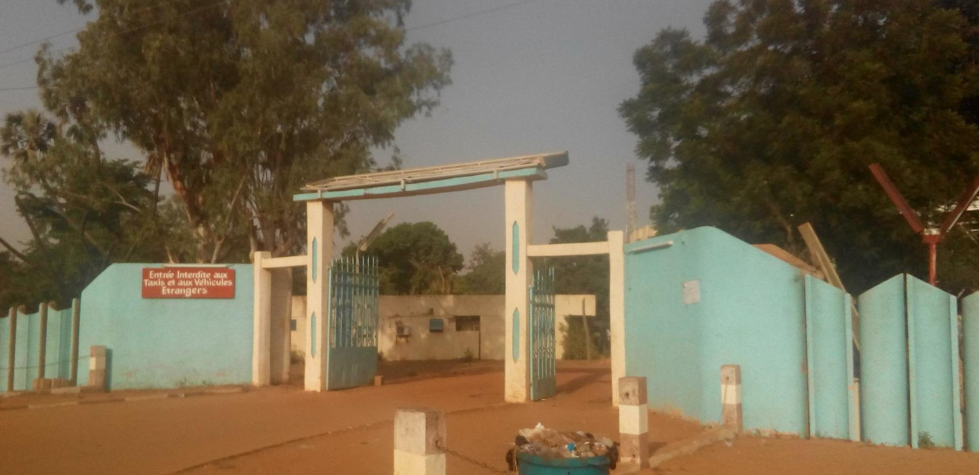 UAM Niamey campus entrance